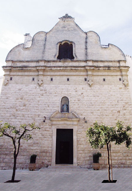 Chiesa di S.Maria Immacolata, detta di S.Rocco (Noicattaro)